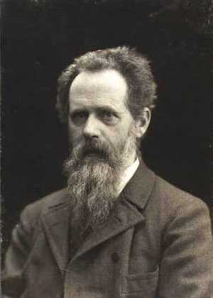 Johan Ludvig Heiberg (27.Nov.1854-04.Jan.1928)